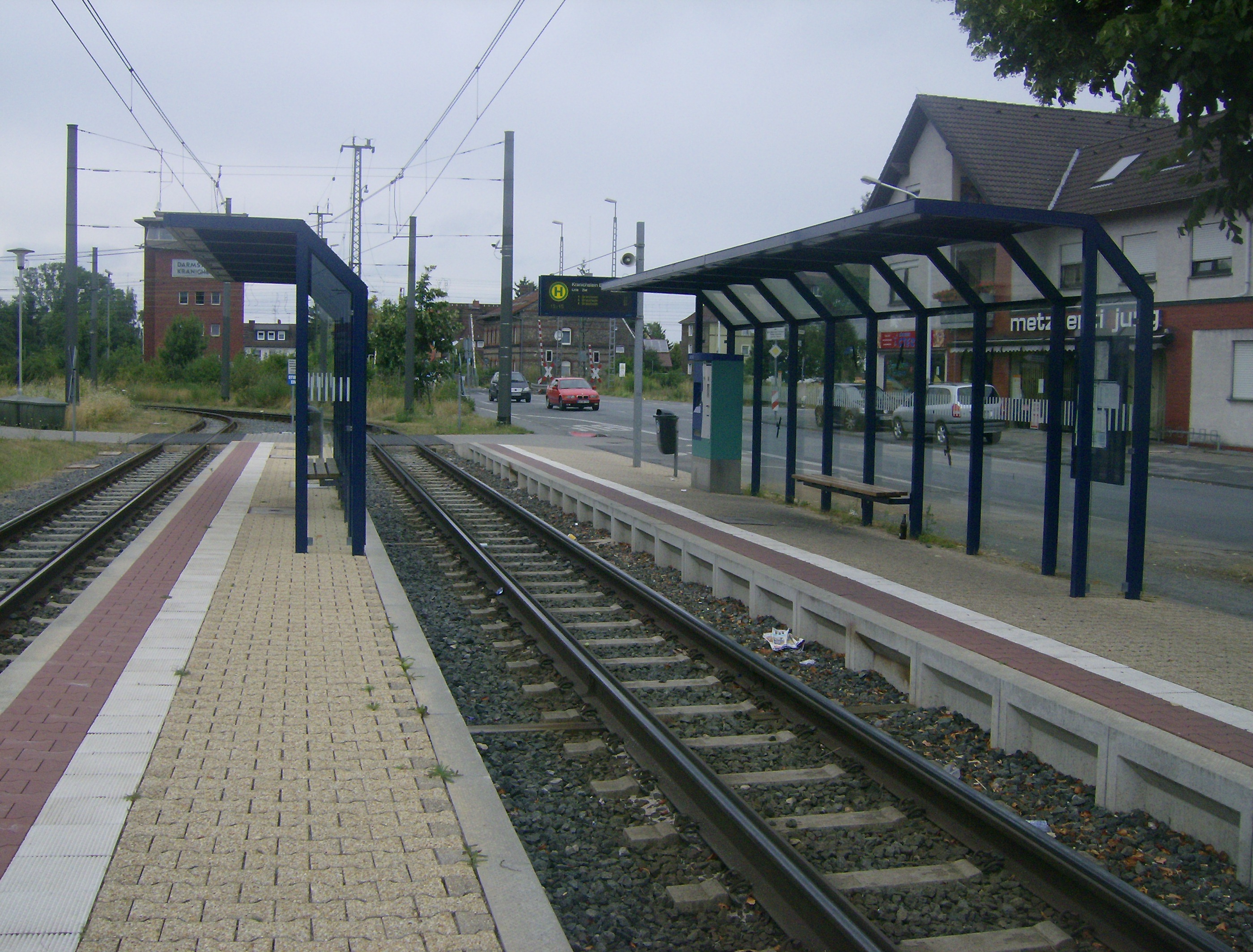 Eine Haltestelle der Straßenbahn in Darmstadt